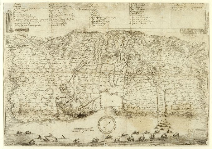 Mapa militar de l'arribada de les tropes de Joan d'Austria a Barcelona el 1652. Mostra la situació de les tropes al voltant de la ciutat.